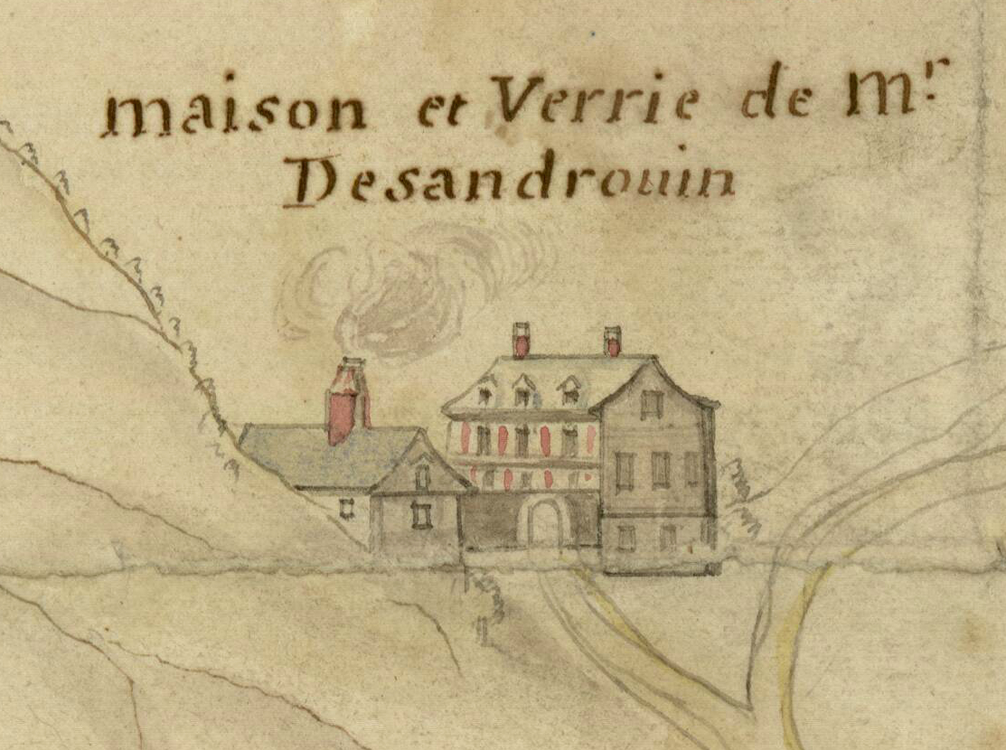 Carte et plan figuratif de la principale partie du village de Lodelinsart, avec les élévations de l'église et de quelques maisons situées sur la place en face de cette dernière, etc., exécutés par l'arpenteur Charles Lannoy, en 1722. Extrait.